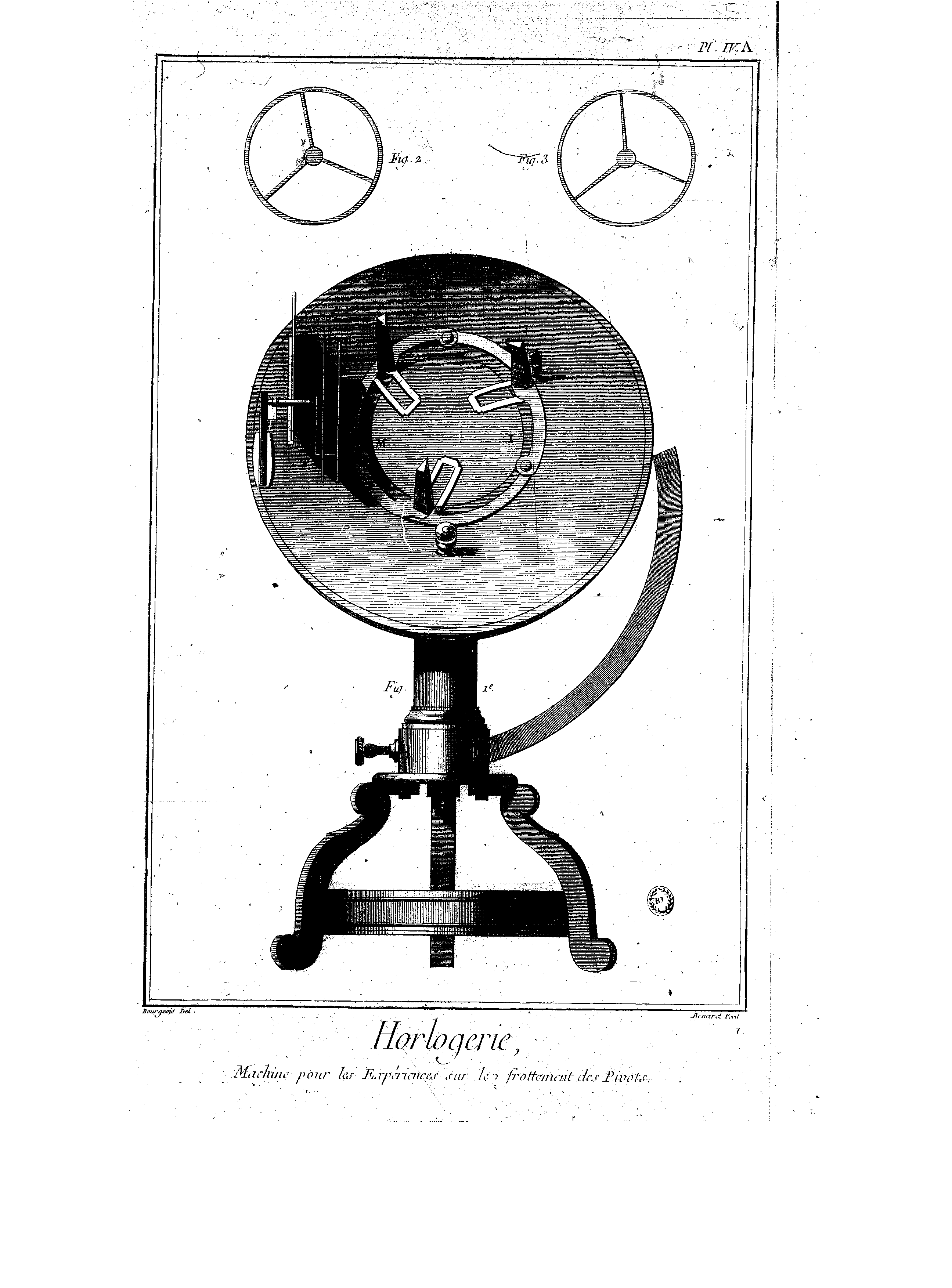 Planches de l'Encyclopédie de Diderot et d'Alembert, volume 3